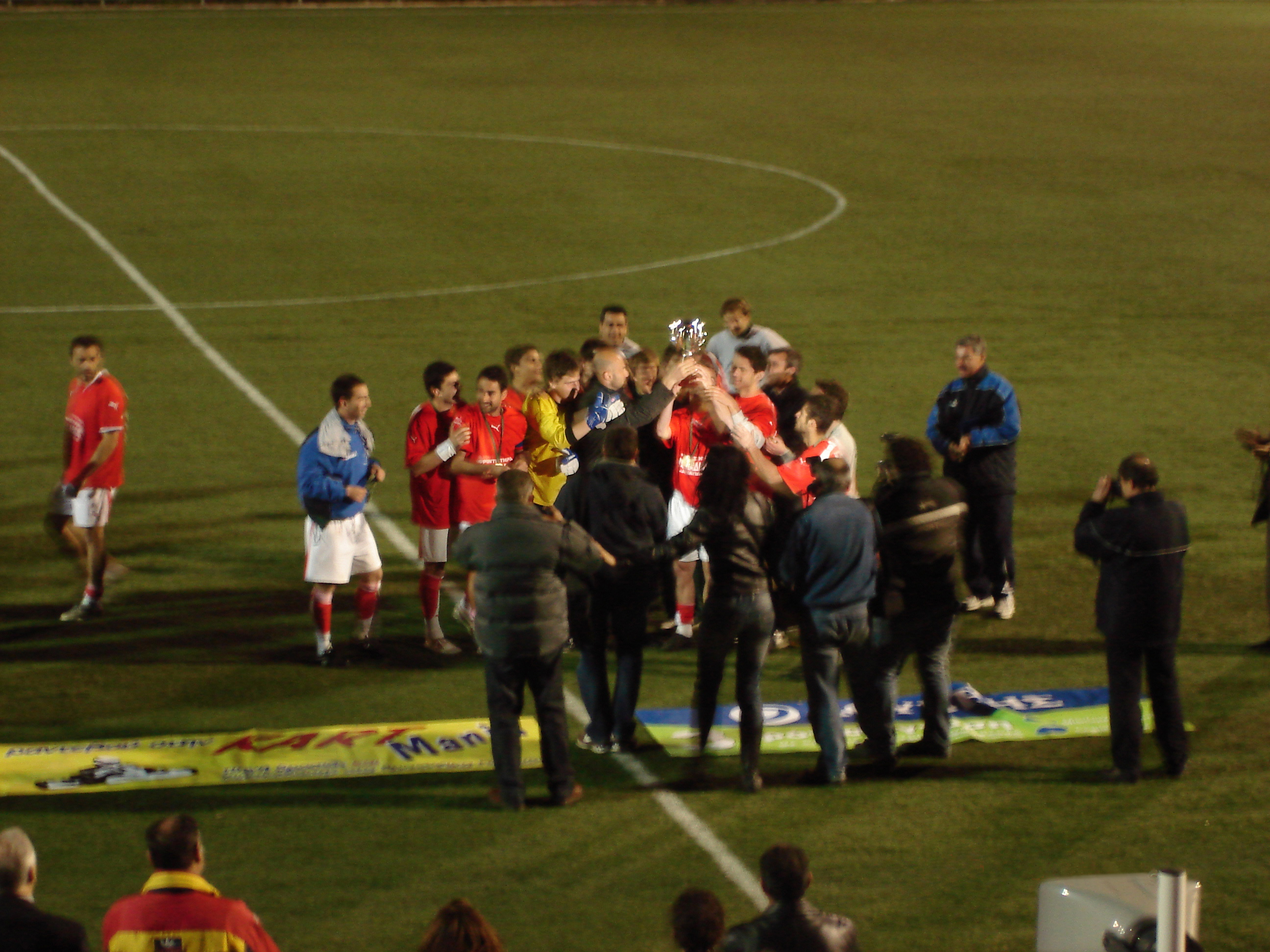 Achaea amateur football cup 2007-08 Κύπελλο ερασιτεχνών Αχαΐας 2007-08, η νικήτρια του κυπέλλου Αχιλλέας Καμαρών